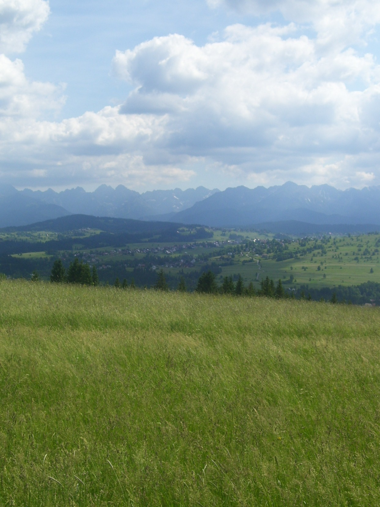 Czarna Góra - Spisz